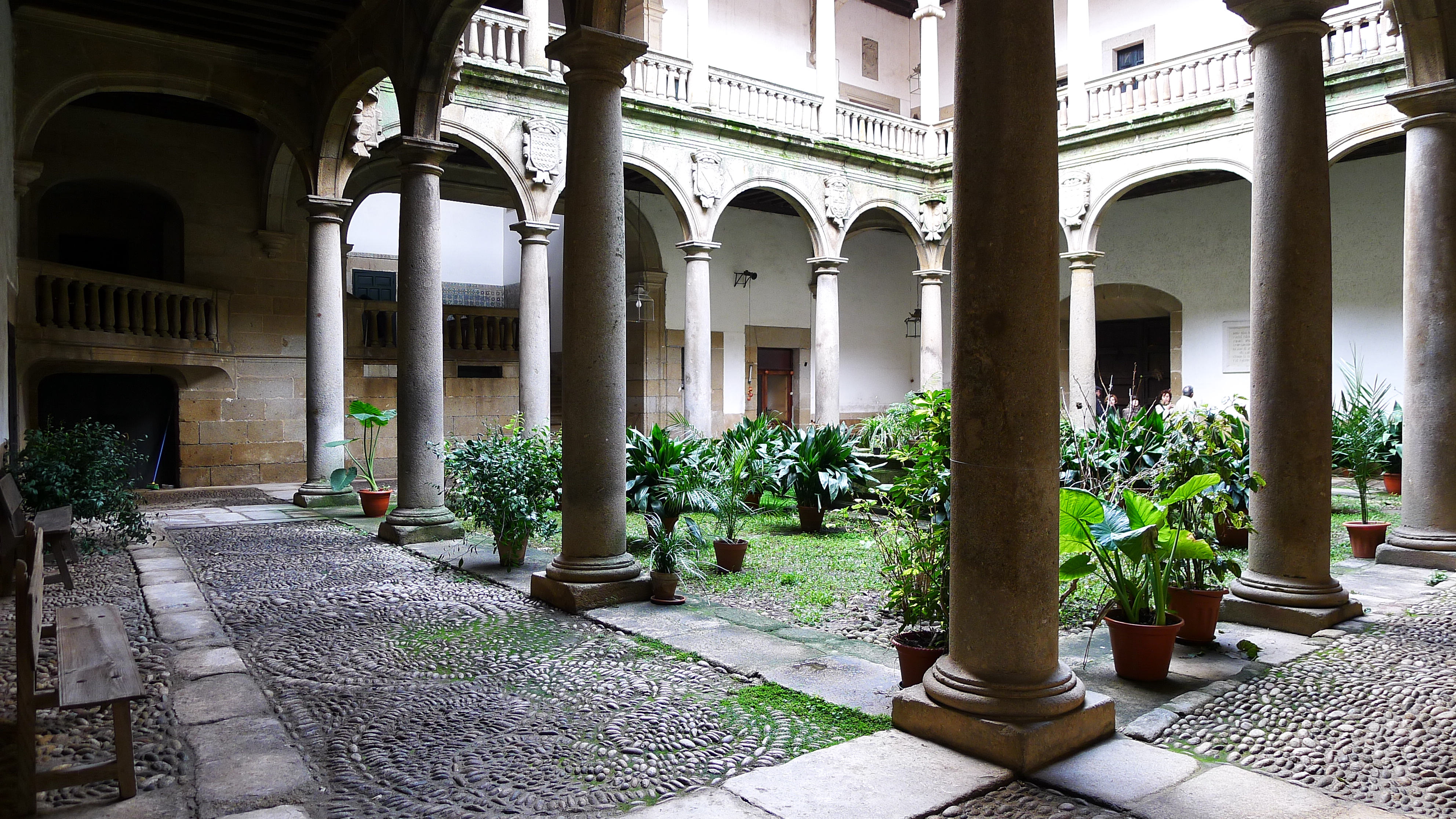 La Casa de los Zúñigas. En el palacio de condes de Plasencia, don Álvaro de Zúñiga y Leonor de Pimentel, Fadrique de Zúñiga Sotomayor (1465-1537), I Marqués de Mirabel, y, principalmente, Luis de Ávila y Zúñiga, (1504-1573), su sobrino, estratega militar, amigo íntimo de Carlos V, y admiradores del arte renacentista, promueven este magnífico patio.